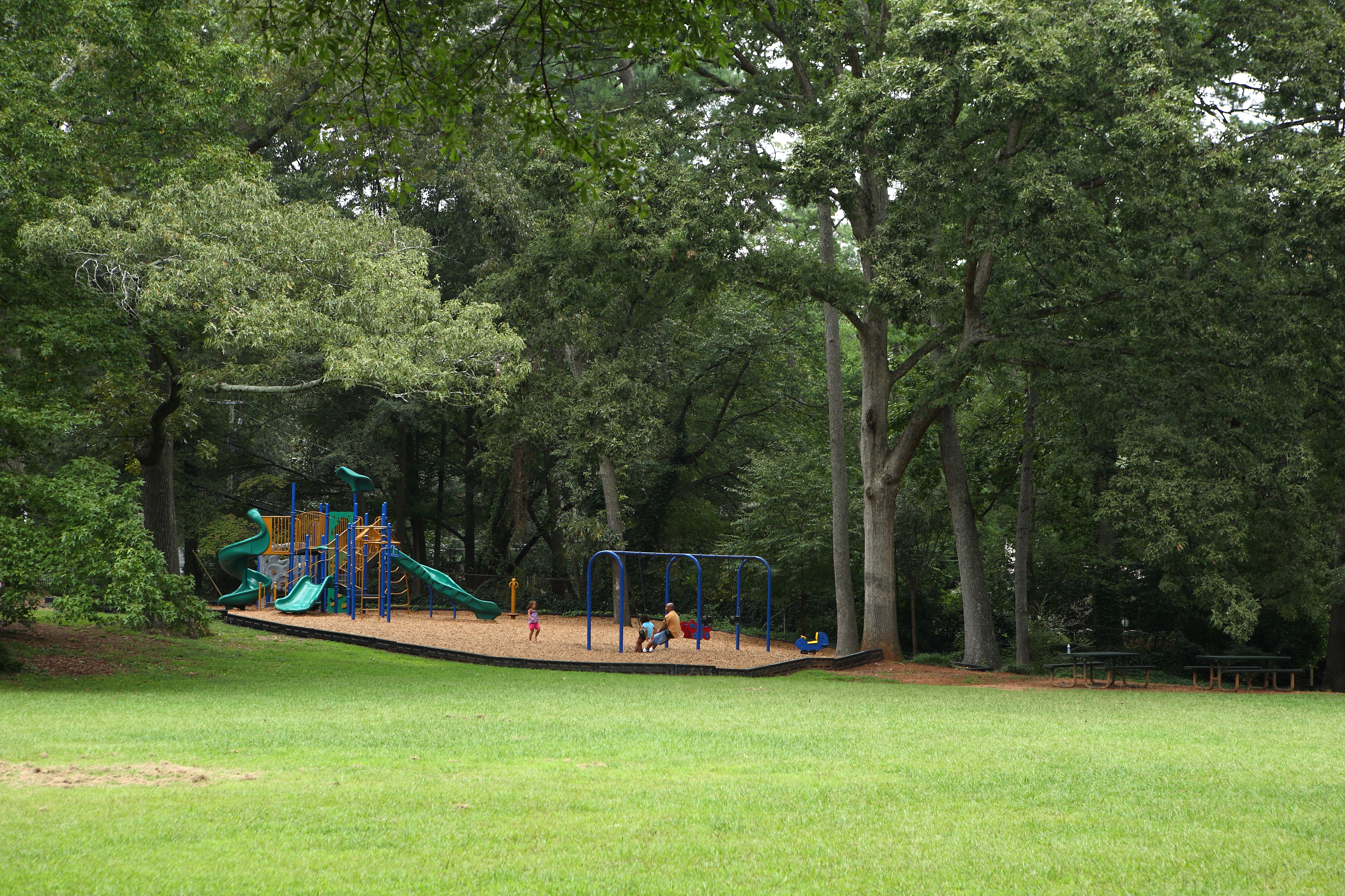 adair park atlanta